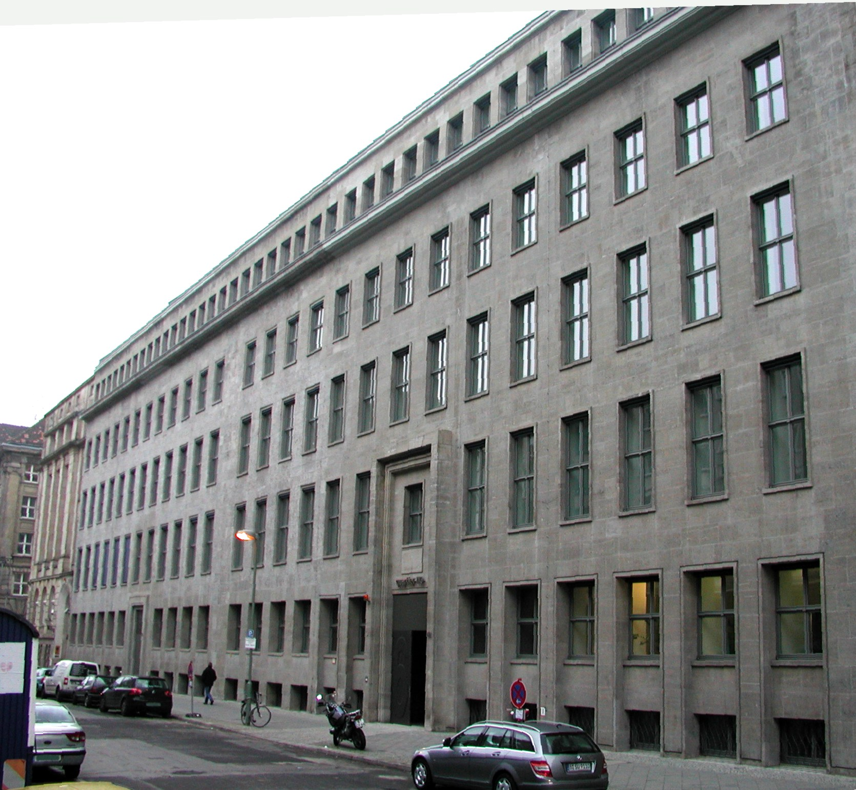 ehemalige Lebensversicherungsbank in Berlin, Architekt:Rosskotten